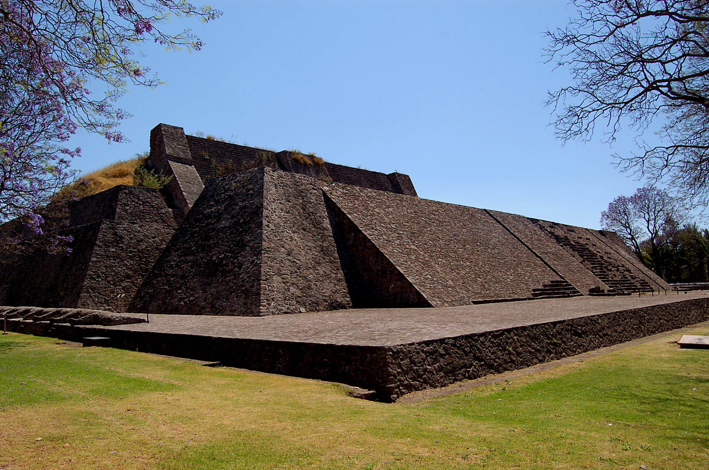 Tenayuca pyramid